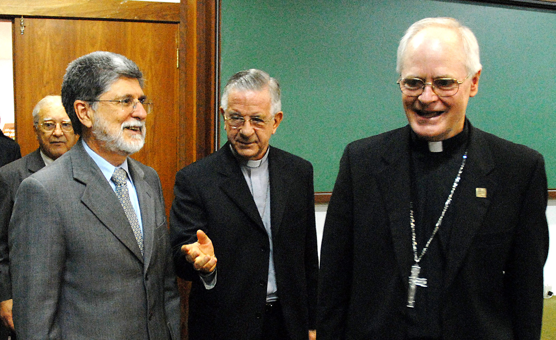 O ministro das Relações Exteriores Celso Amorim, o cardeal-arcebispo de Salvador Geraldo Majella Agnelo e o bispo-auxiliar de São Paulo e secretário da CNBB, Odilo Scherer.